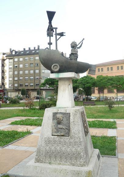 Pinin's statue/Estatua del personaje Pinín